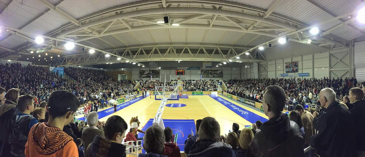 Match de Play-Off de Nationale 2 féminine